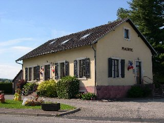 village de Lagrange (Territoire de Belfort), la mairie Photo prise en mai 2004 par LP90 Licence GFDL LP90 mai 2004